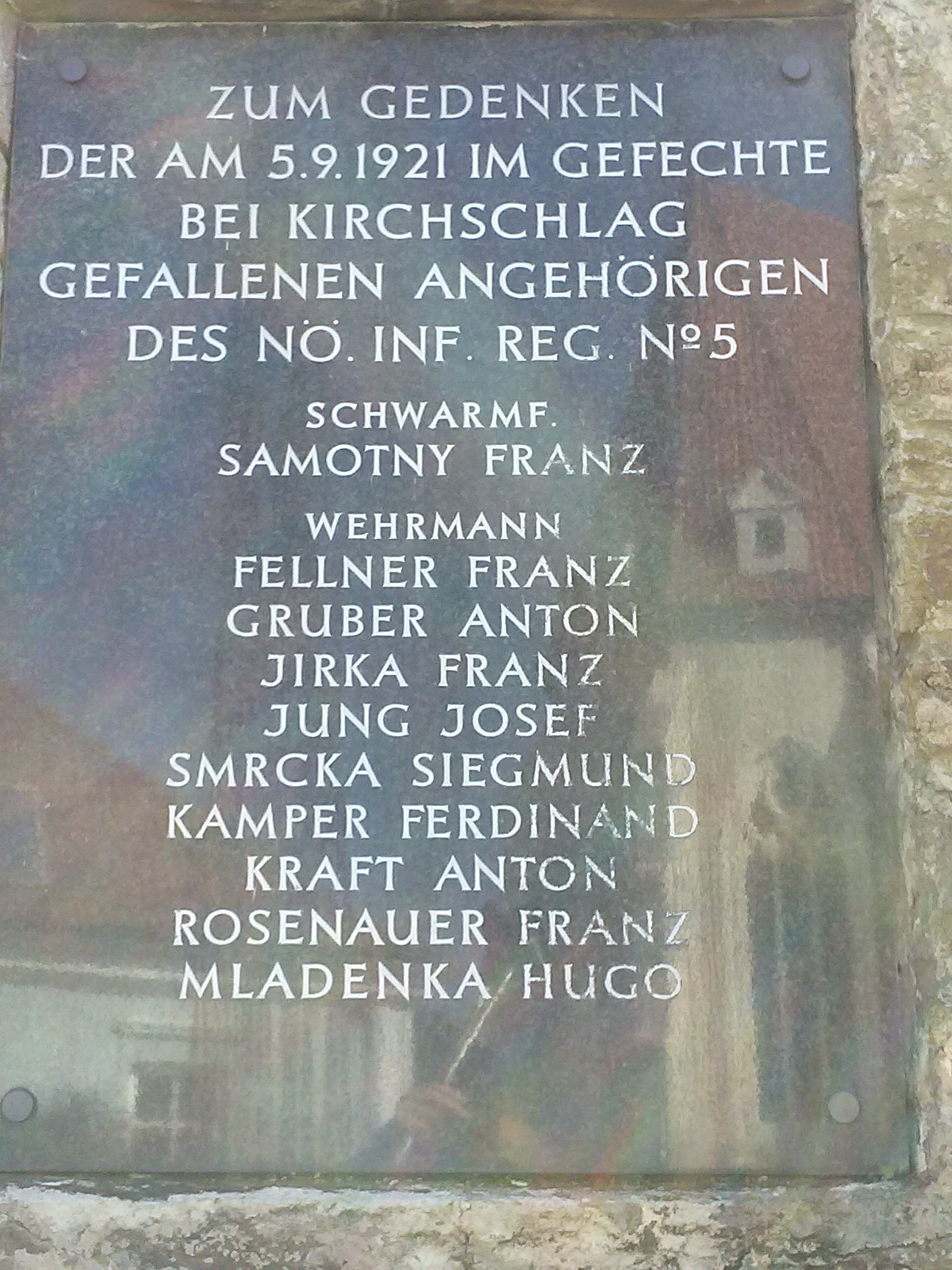 Denkmal an die Toten des Bundesheeres während der Landnahme des Burgenlandes 1921.